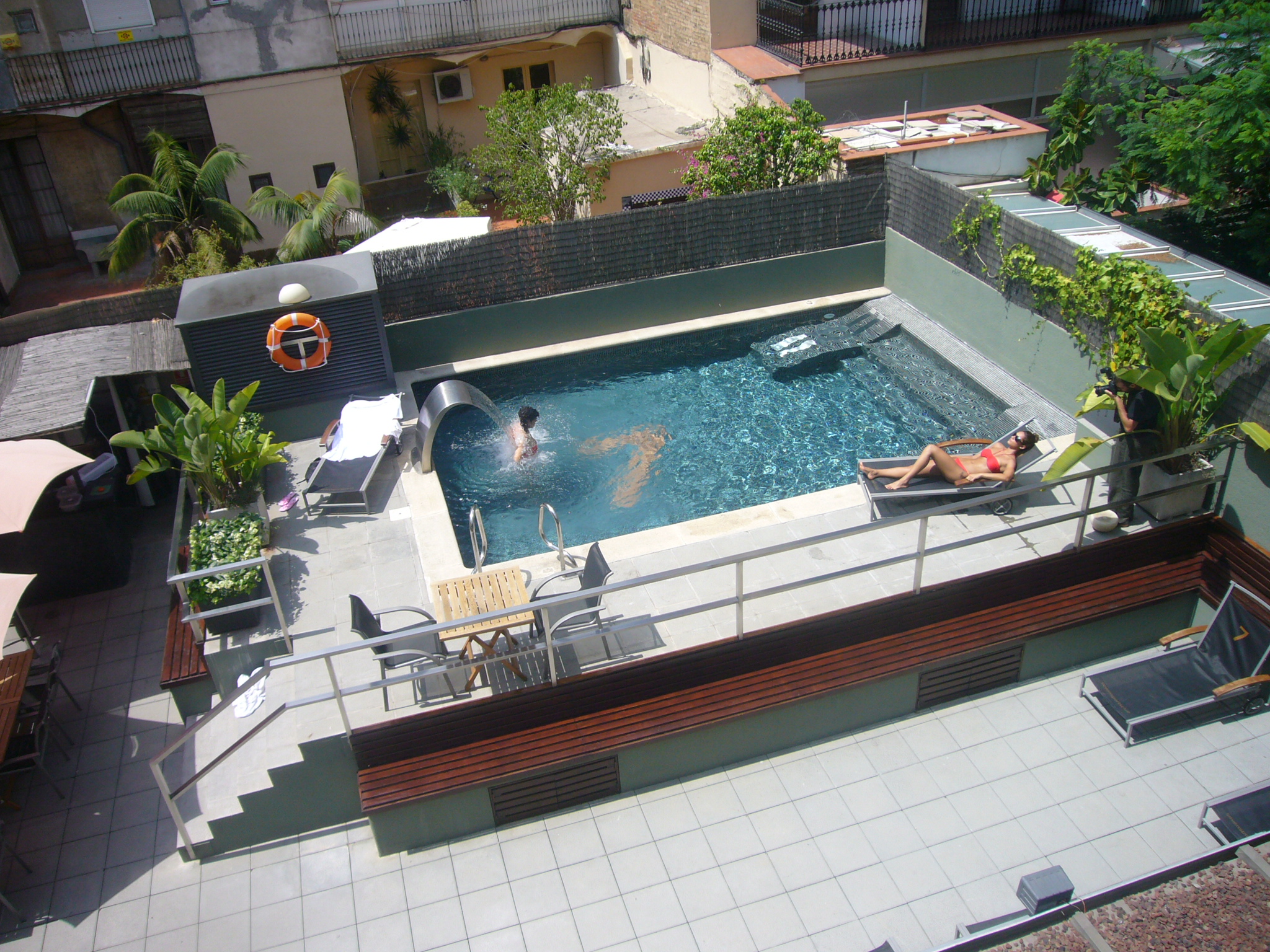 Piscina exterior DiR - Seven. Ptge. Domingo 7, Barcelona